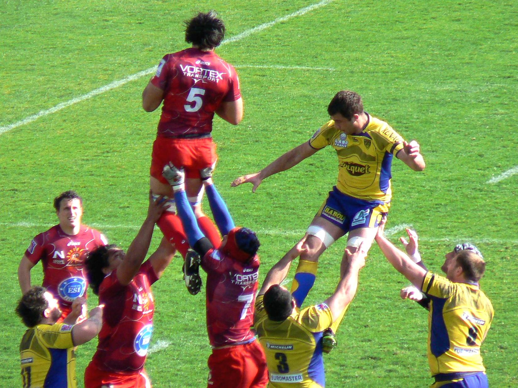 Une touche opposant l'ASM Clermont Auvergne au Montpellier Hérault RC au Stade Marcel Michelin de Clermont-Ferrand. Mickael De Marco (à gauche) et Alexandre Lapandry (à droite).